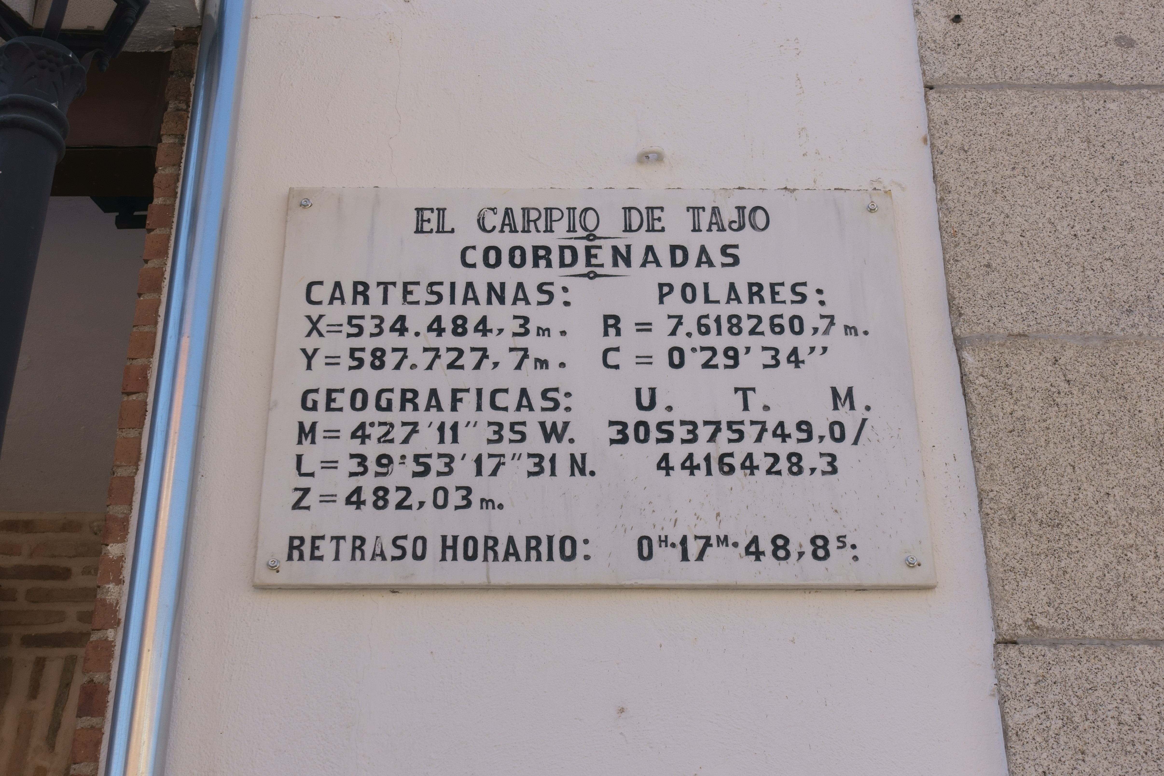 Placa indicativa de las coordenadas de El Carpio de Tajo (Toledo, España).